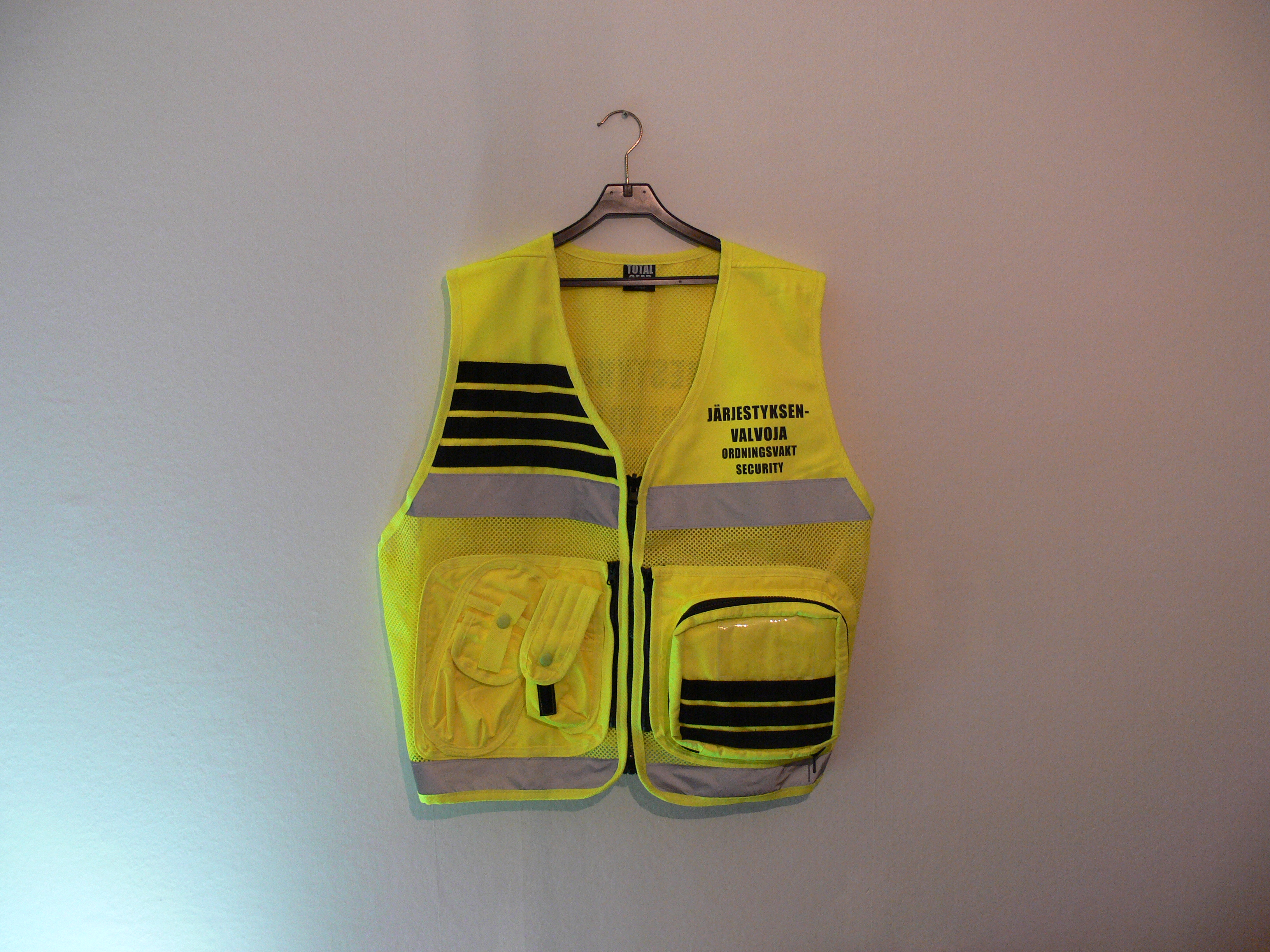 Järjestyksenvalvojan tunnusliivi